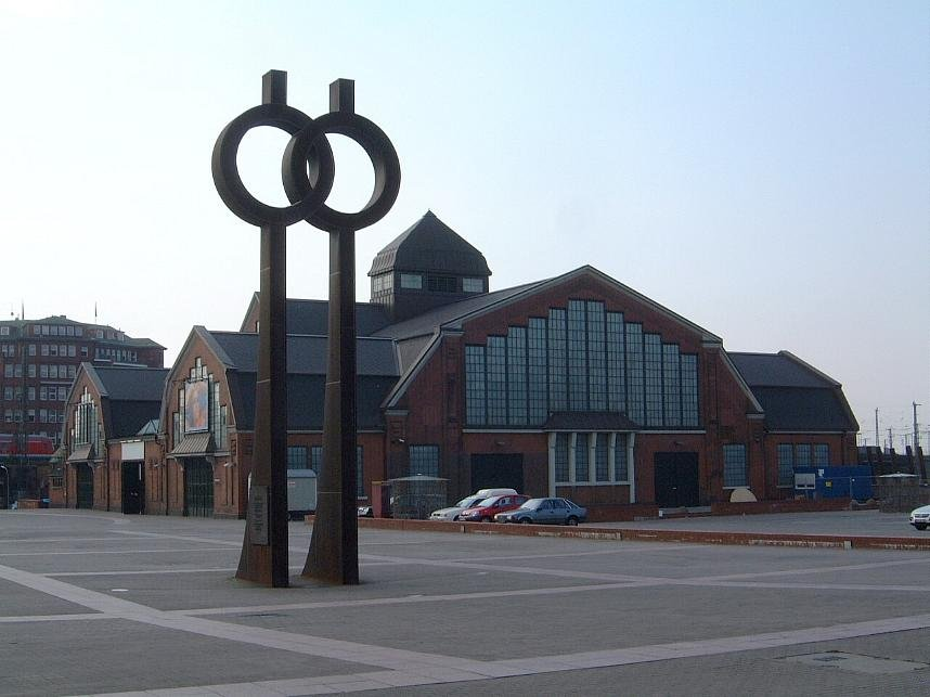 Deichtorhallen in Hamburg - Haus der Photographie.This is a photograph of an architectural monument.